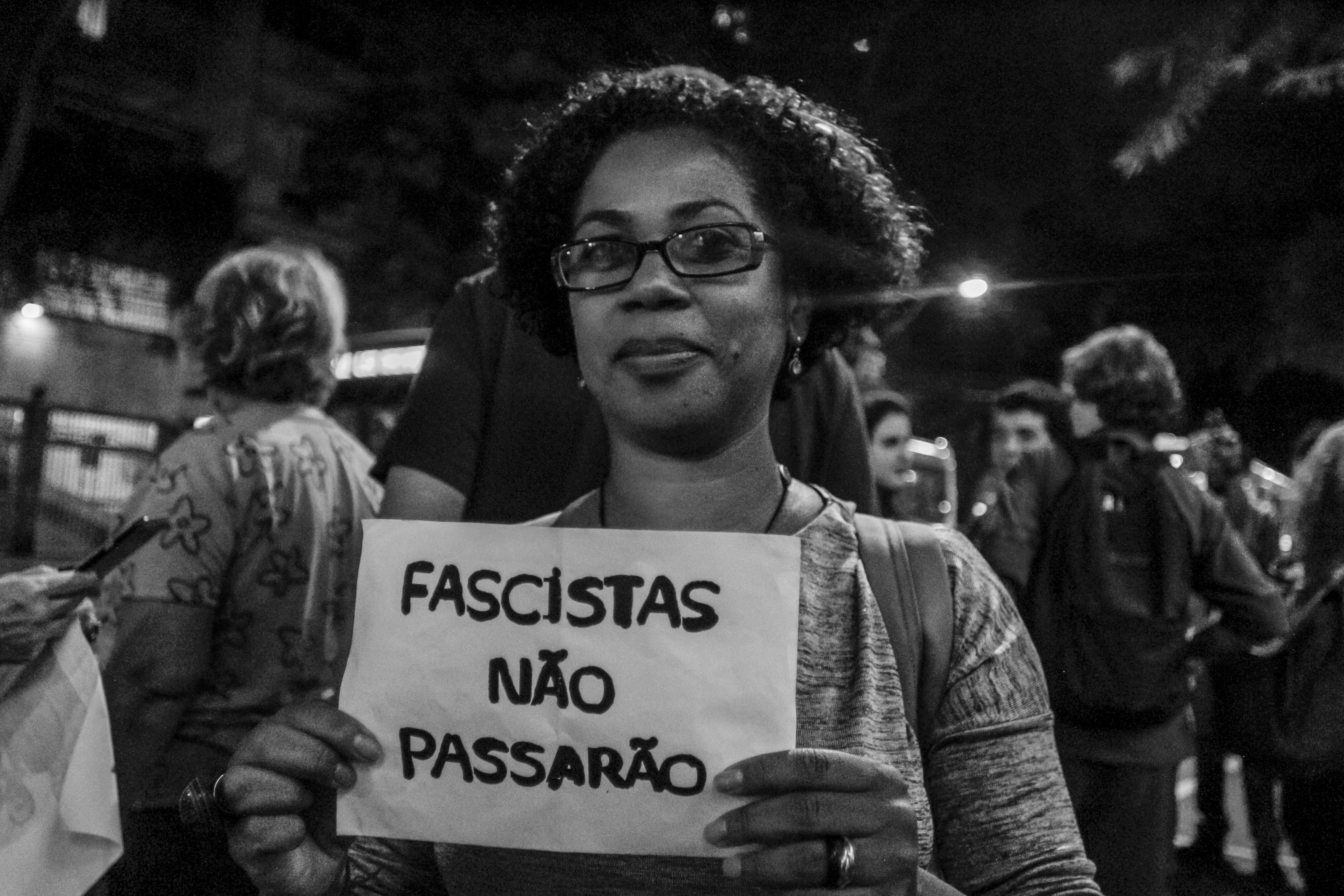 Jair Bolsonaro e o Clube Hebraica Rio de Janeiro, localizado em Laranjeiras, foram surpreendidos por um protesto no início desta noite. O motivo da ação foi porque a Hebraica convidou o deputado misógino para uma palestra "em nome de toda a comunidade judaica", o que acabou ofendendo (e com razão) judeus e judias que são contrários as ideologias fascistas de Bolsonaro, que se manifestaram baixo o lema #NãoEmNossoNome Foto: Ramon Aquim / Mídia NINJA